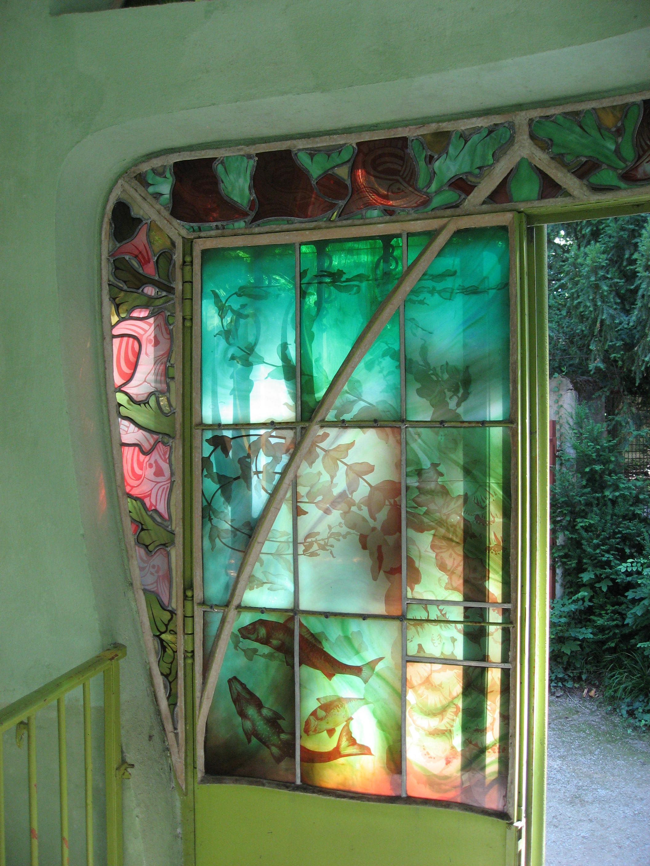 Aquarium de la maison de campagne de Eugène Corbin, site actuel du Musée de l'École de Nancy Réalisé vers 1904 Architecte: Lucien Weissenburger Vitraux: Jacques Grüber Map: 48° 40' 49" N 6° 9' 57" E